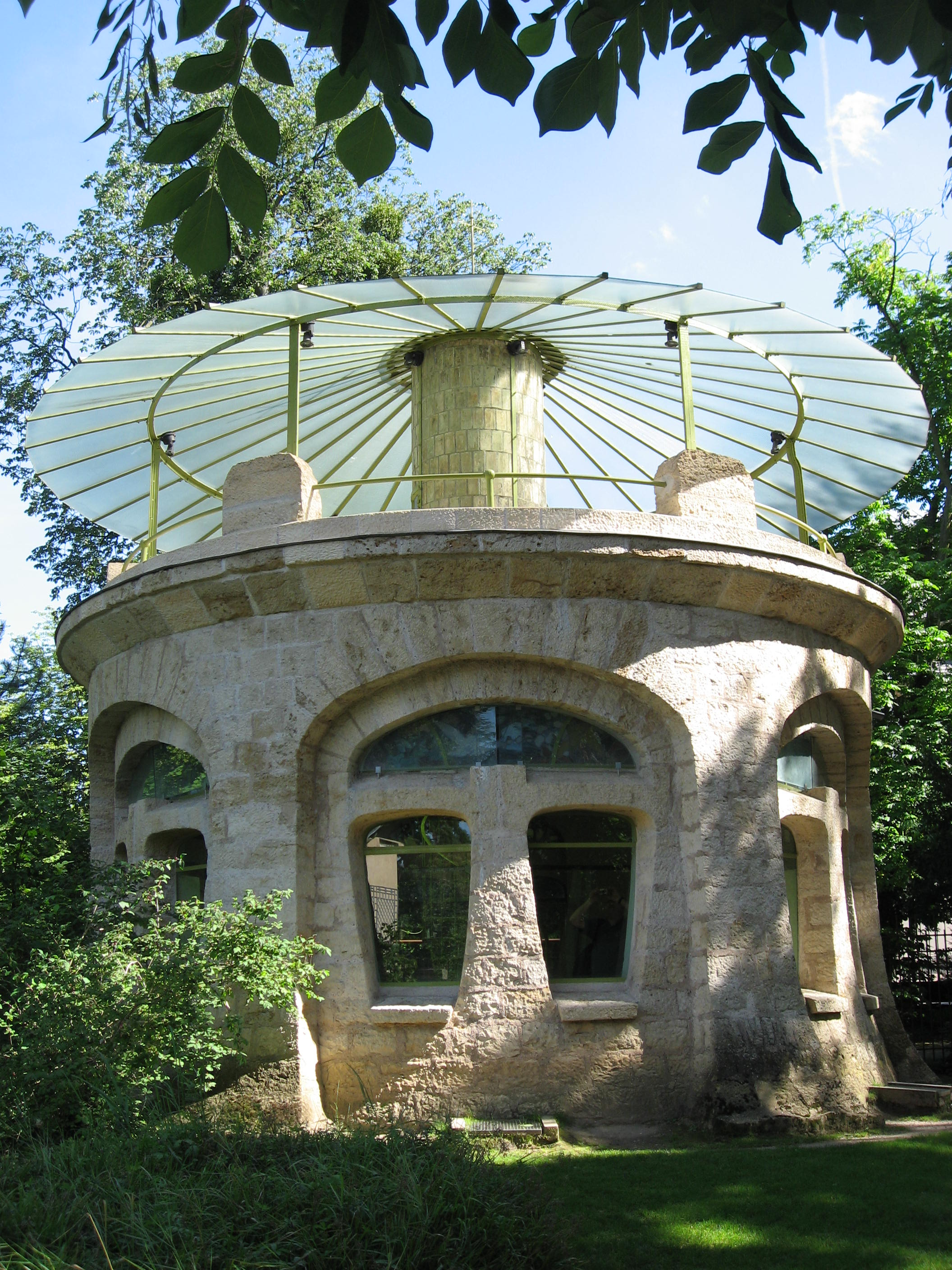 Aquarium de la maison de campagne de Eugène Corbin, site actuel du Musée de l'École de Nancy Réalisé vers 1904 Architecte: Lucien Weissenburger Vitraux: Jacques Grüber